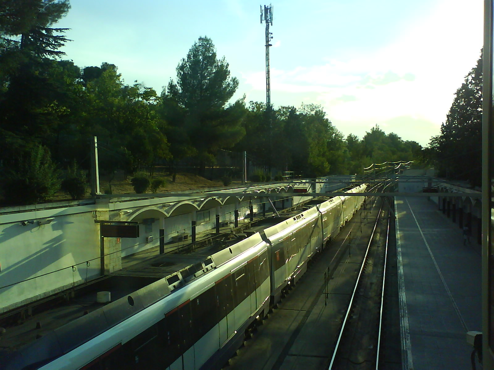 Tren de la serie 7000 en la estación de Lago del Metro de Madrid.